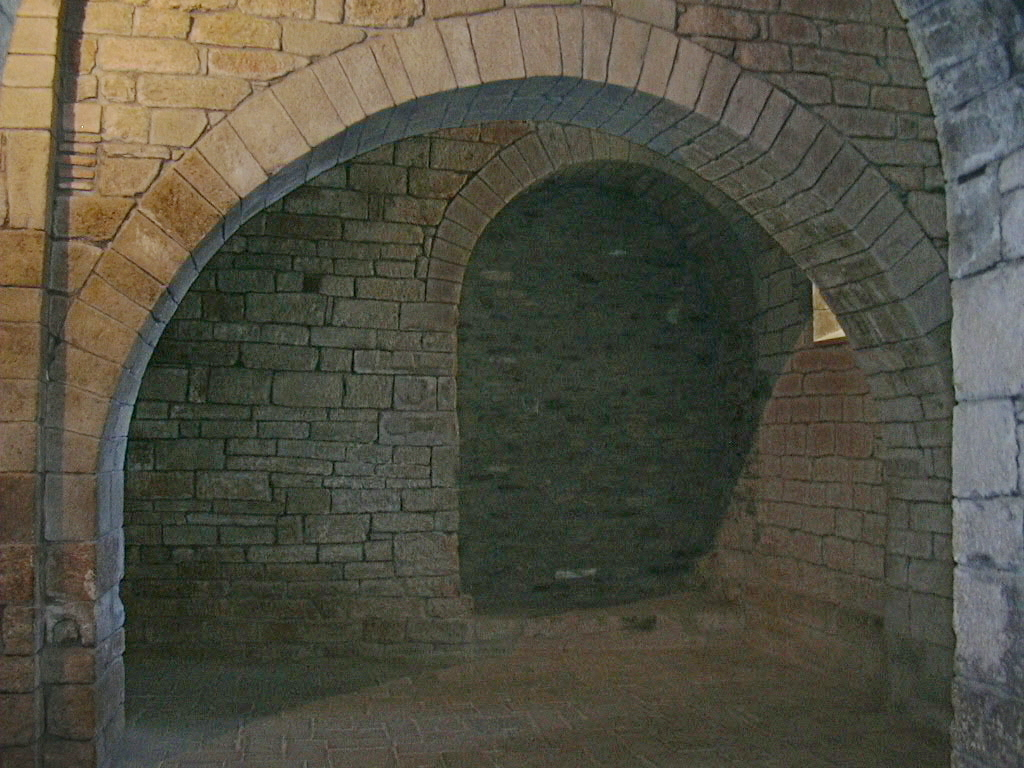 Monasterio de San Juan de la Peña en la provincia de Huesca (España)